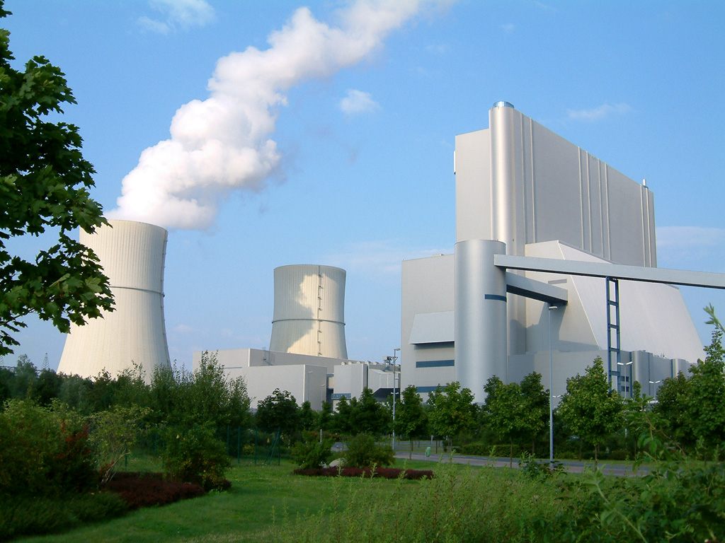 Kraftwerk Schwarze Pumpe (Vattenfall), Spremberg, Land Brandenburg, Deutschland